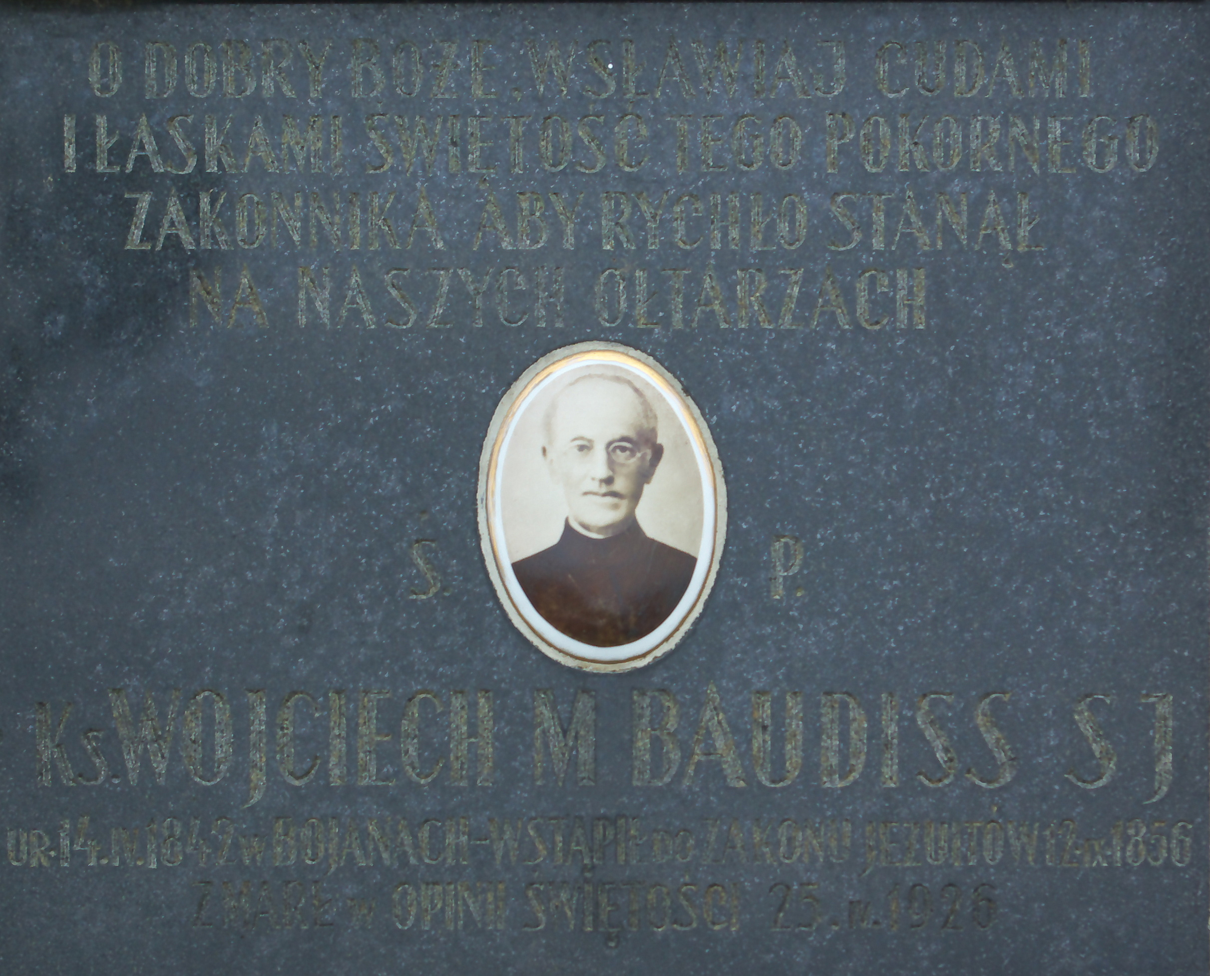 Kaplica grobowa zakonników z Towarzystwa Jezusowego na Cmentarzu w Starej Wsi (2017). Na tablicy epitafijnej upamiętniony o. Wojciech Baudiss.